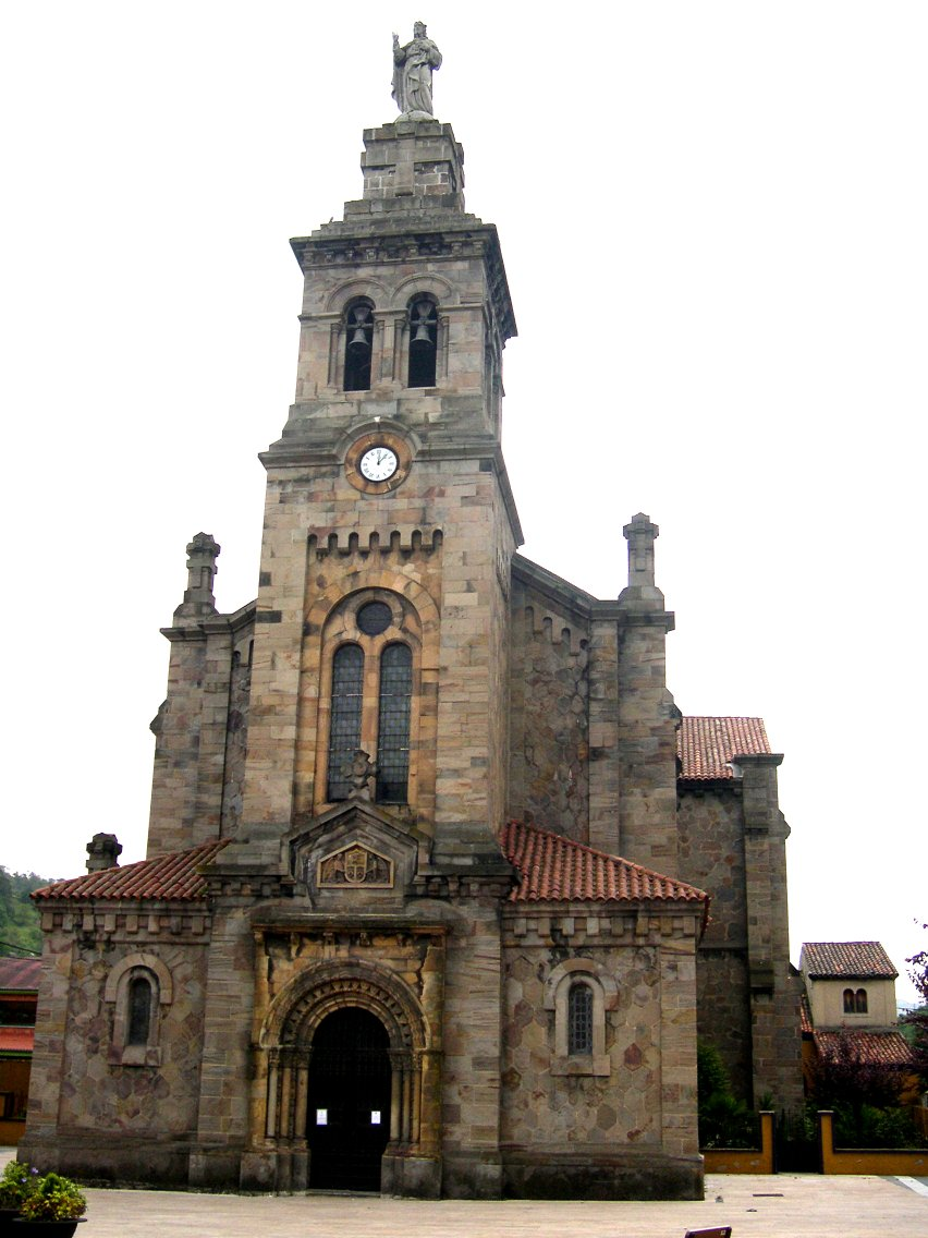 Ilesia de ciañu, llangreu asturies